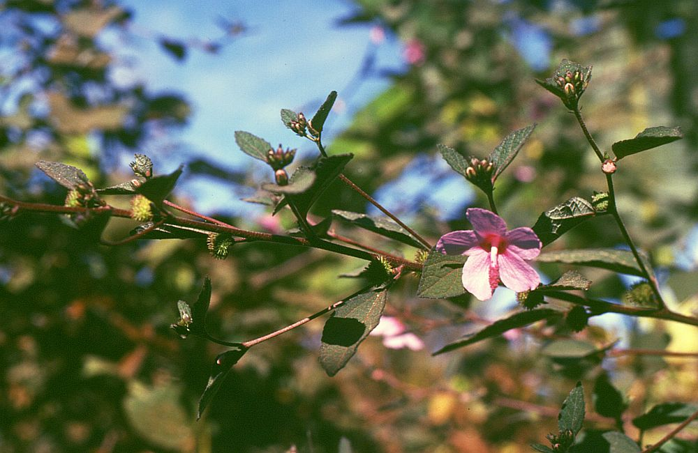 Urena lobata, Malvengewächse (Malvaceae) - Kambodscha/Cambodia, N Ban Lung (Prov. Ratanakkiri)